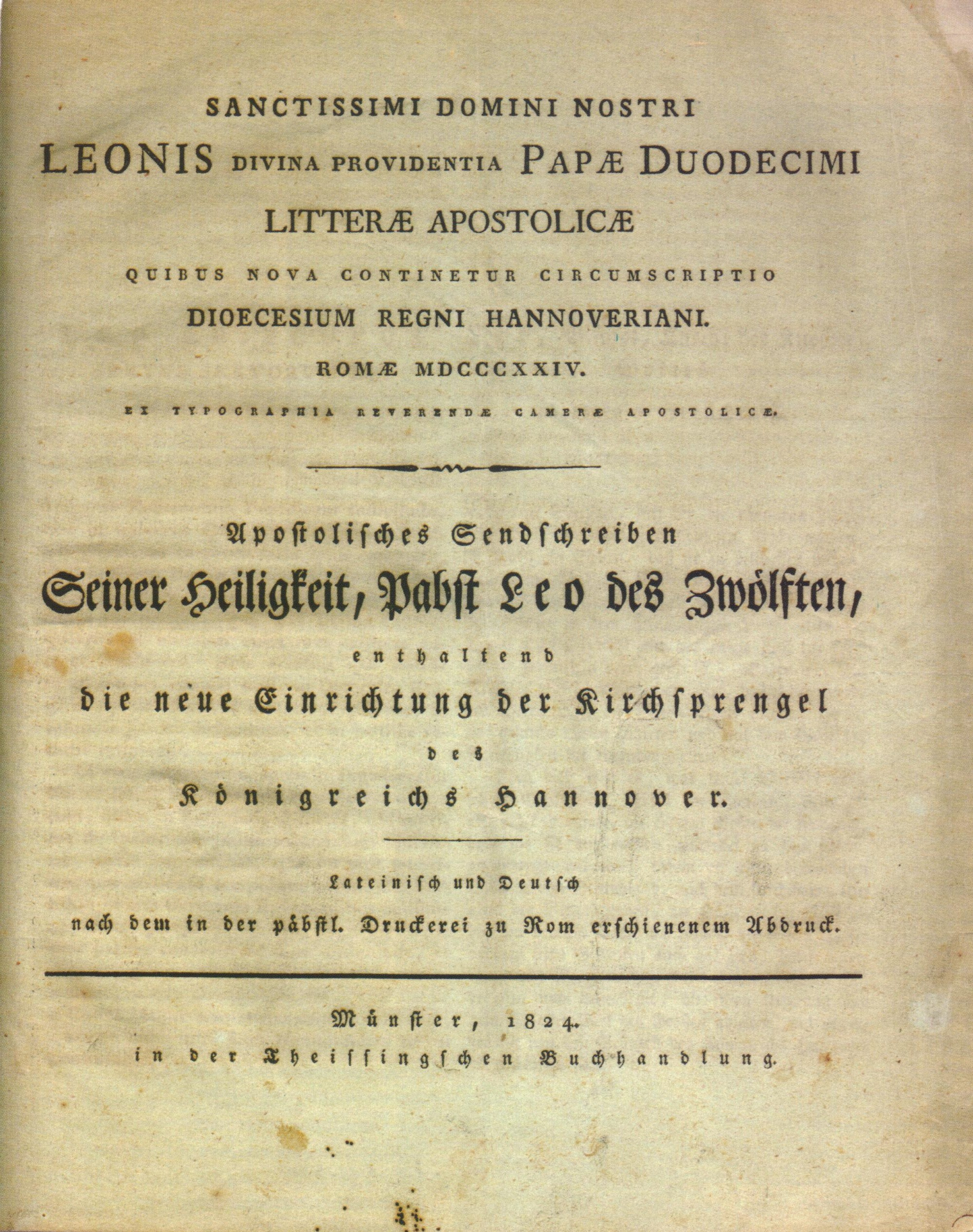 Titelblatt der Druckausgabe (lateinisch/deutsch) der päpstlichen Zirkumskriptionsbulle für das Königreich Hannover 1824